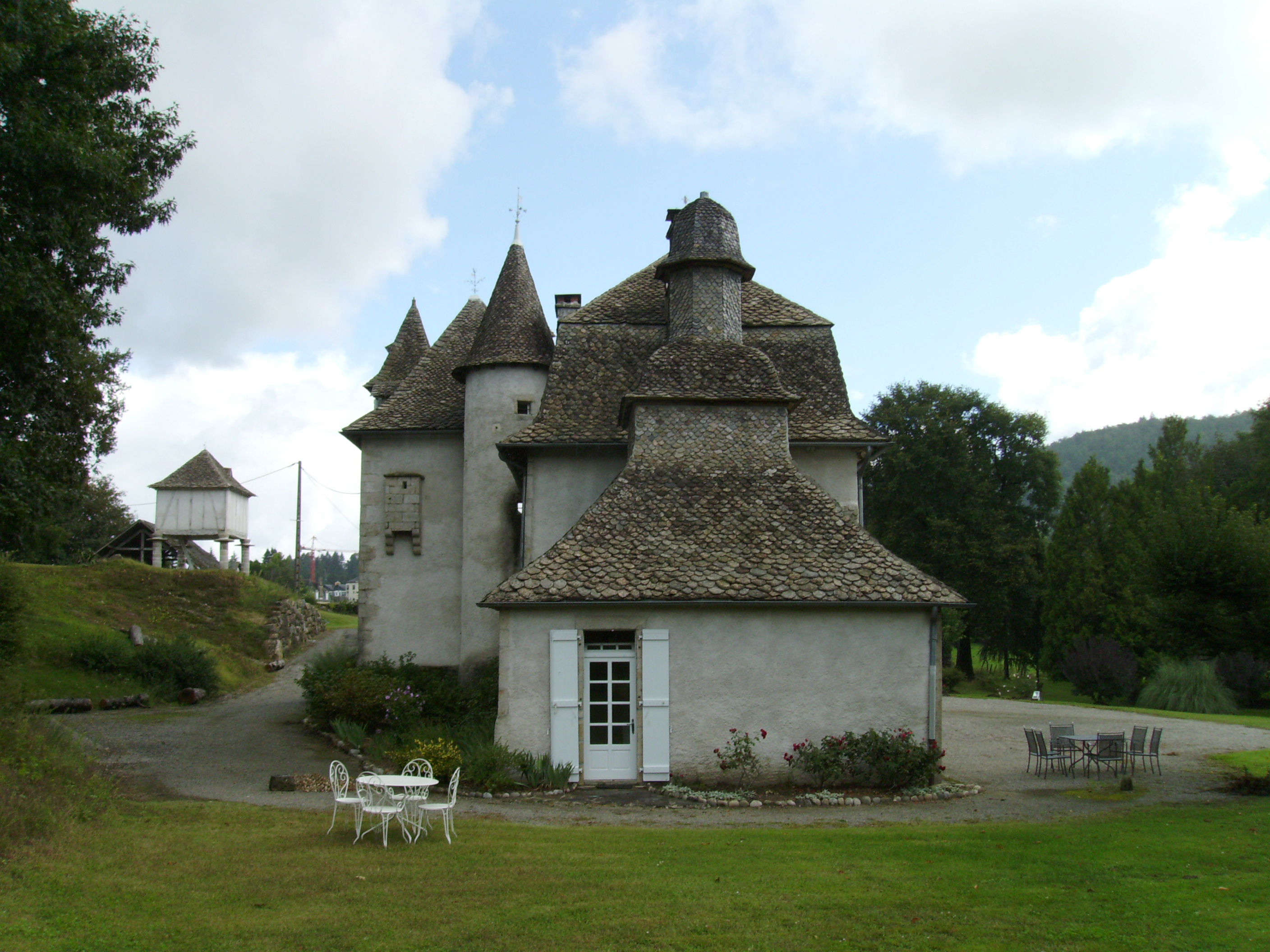 Château du Bac